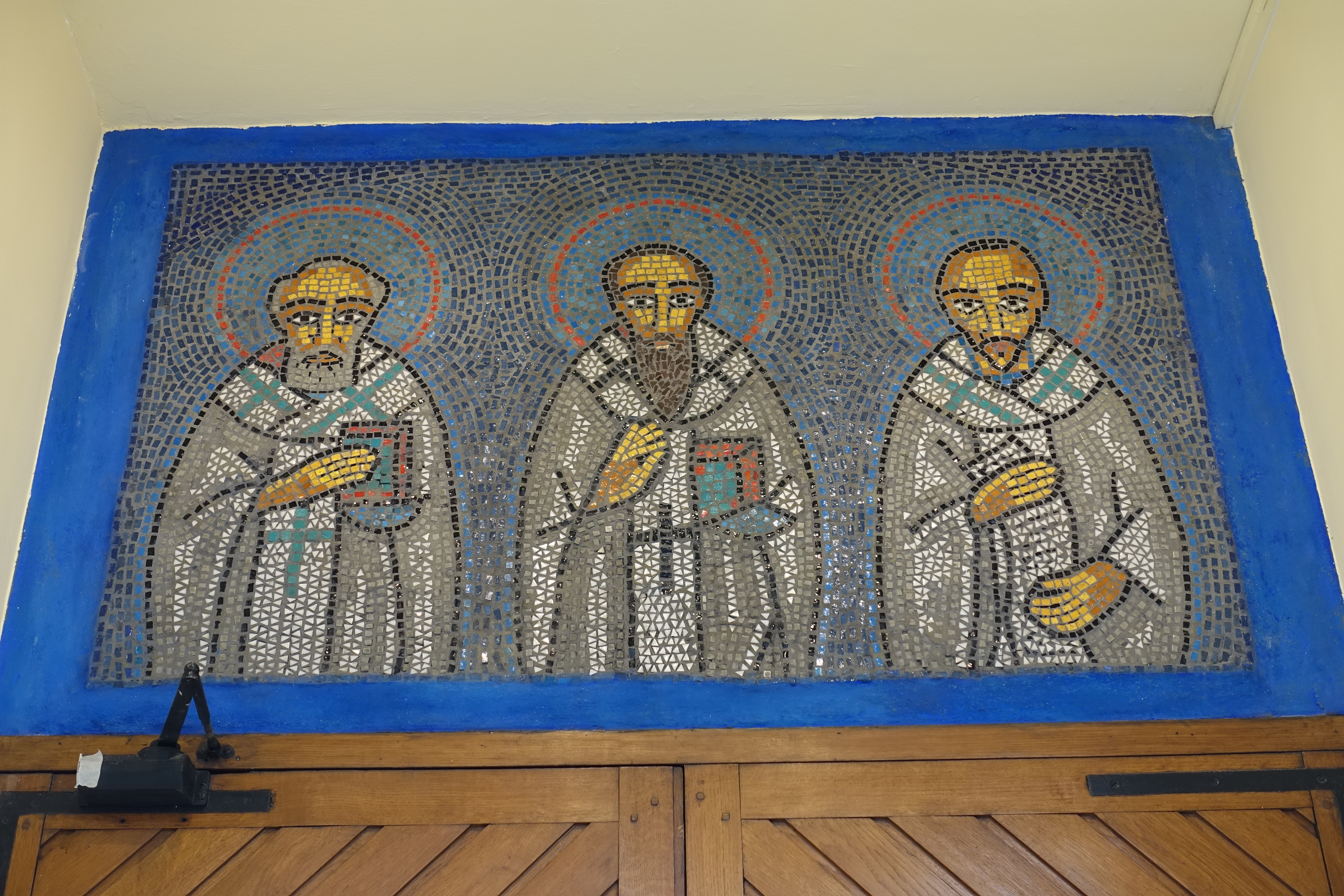 Eglise des Trois-Saints-Docteurs @ Paris